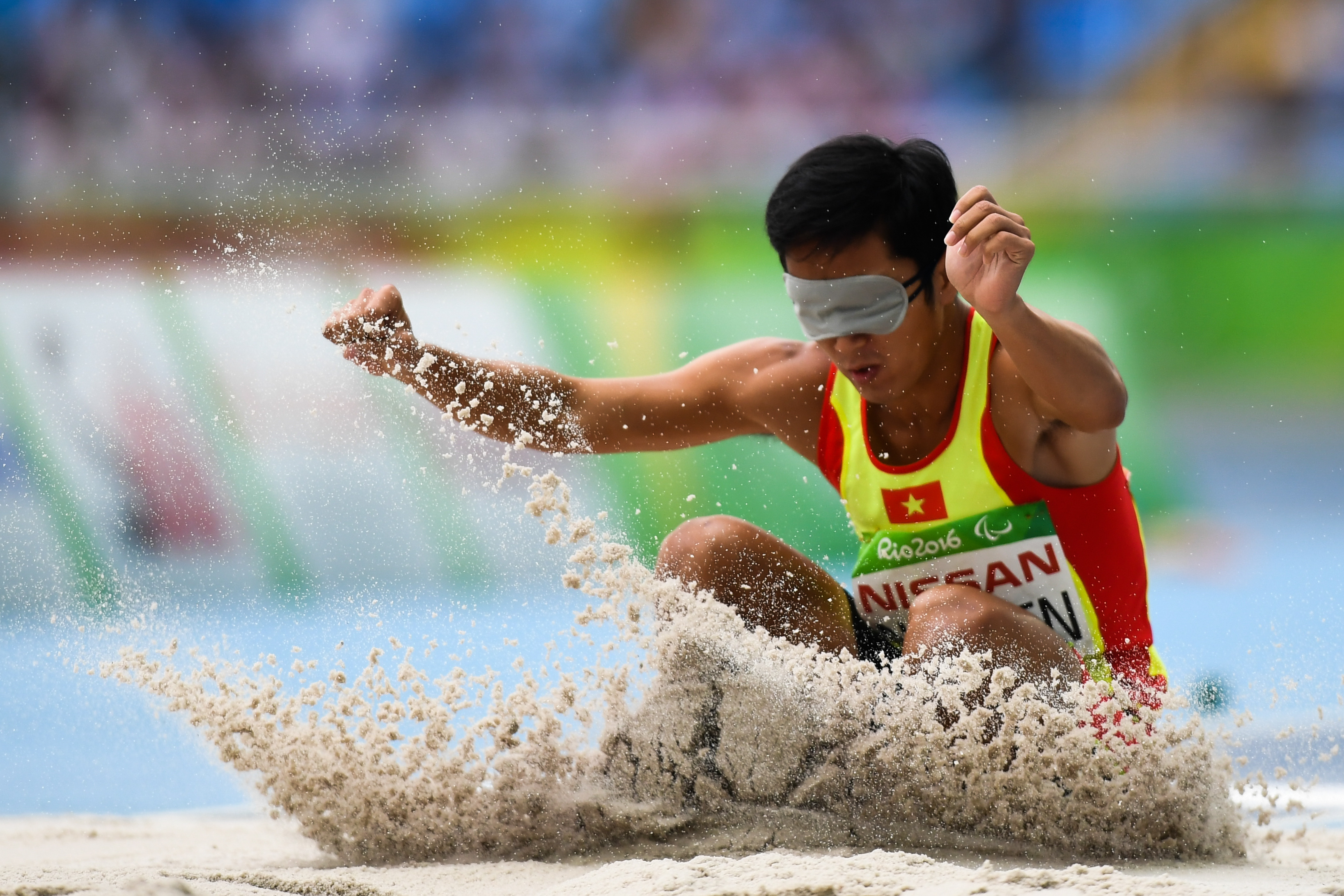 Rio de Janeiro - Salto em distância masculino T11, no primeiro dia das provas de atletismo nos Jogos Paralímpicos Rio 2016 (Tânia Rêgo/Agência Brasil) - Hiep Nguyen Ngoc (vi: Nguyễn Ngọc Hiệp)